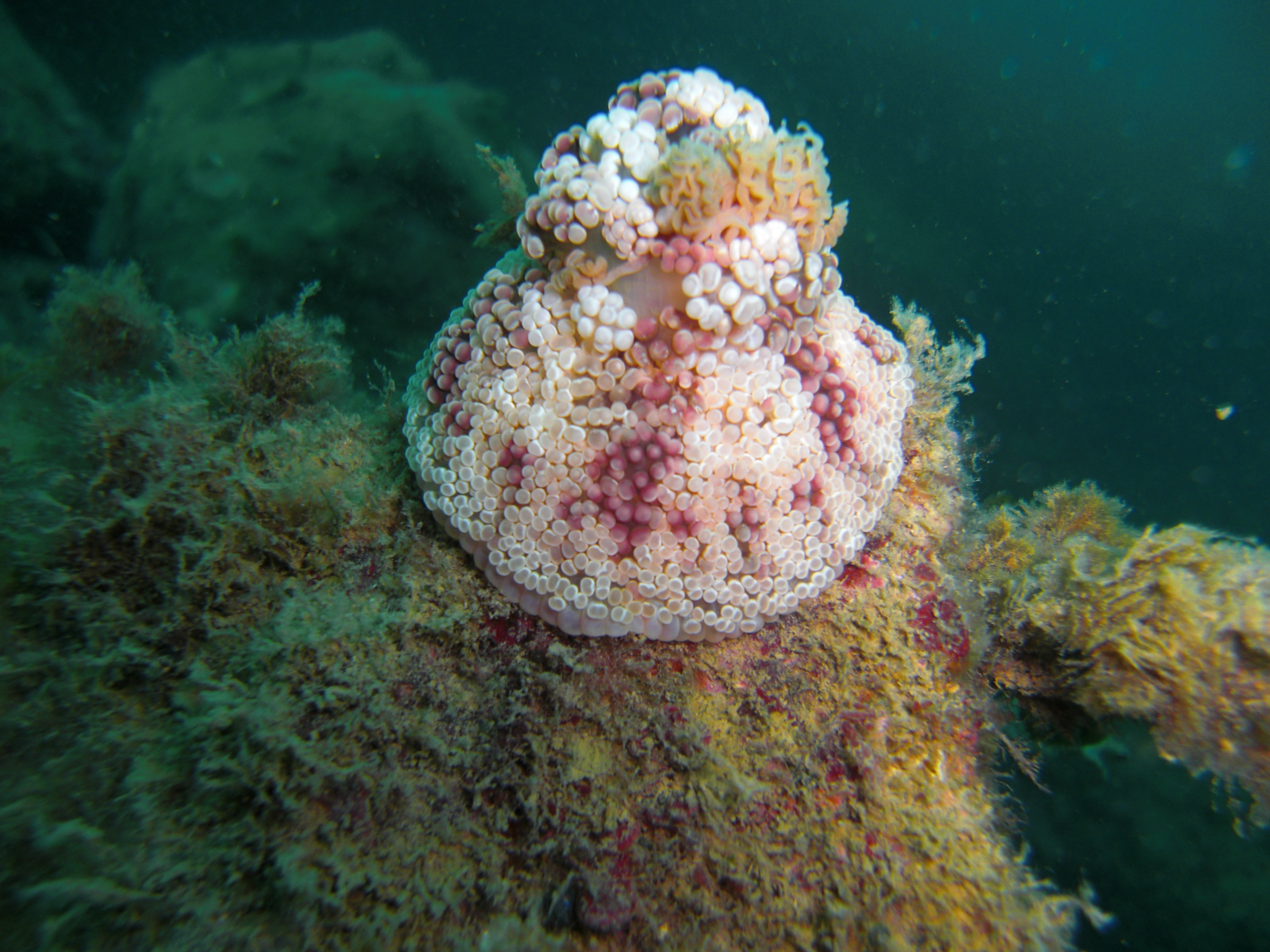 Alicia mirabilis durante il giorno Licensing